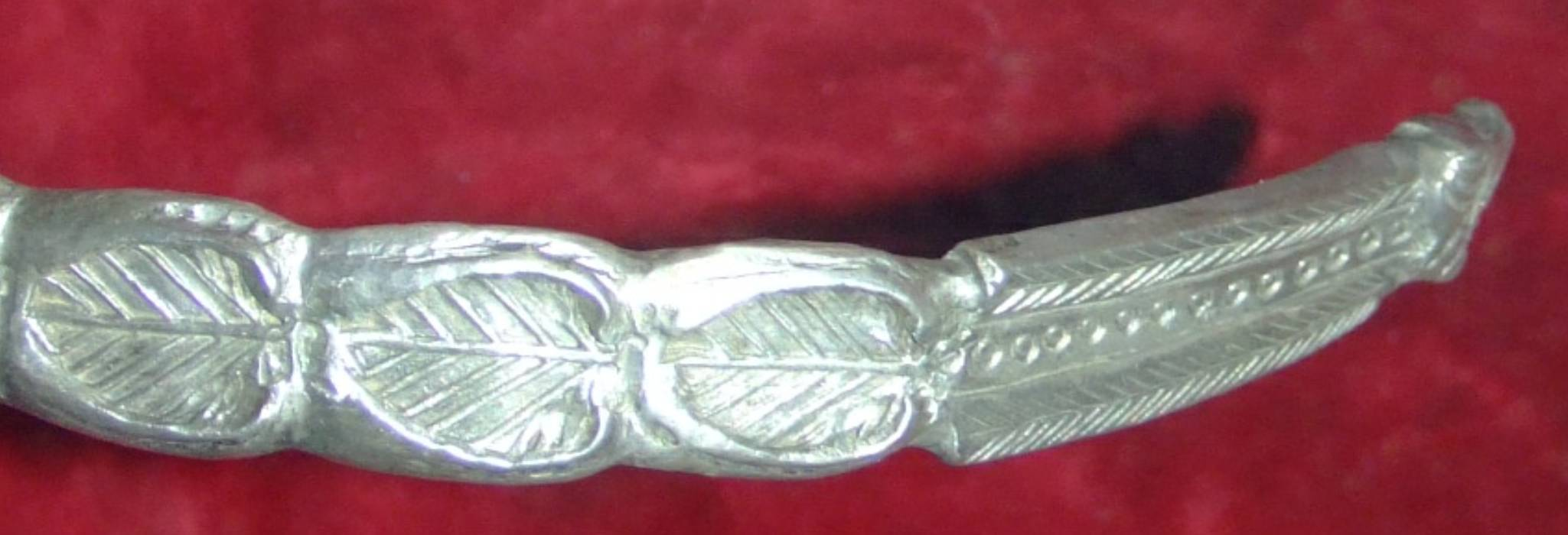 Dacian Bracelet in Cluj Museum